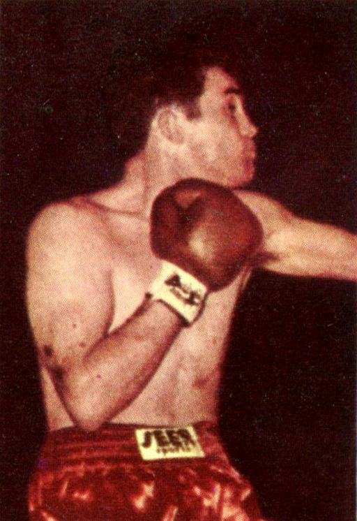 Figurina/Sticker CAMPIONI DELLO SPORT 1967/68-n. 463 - WINSTONE -PUGILATO